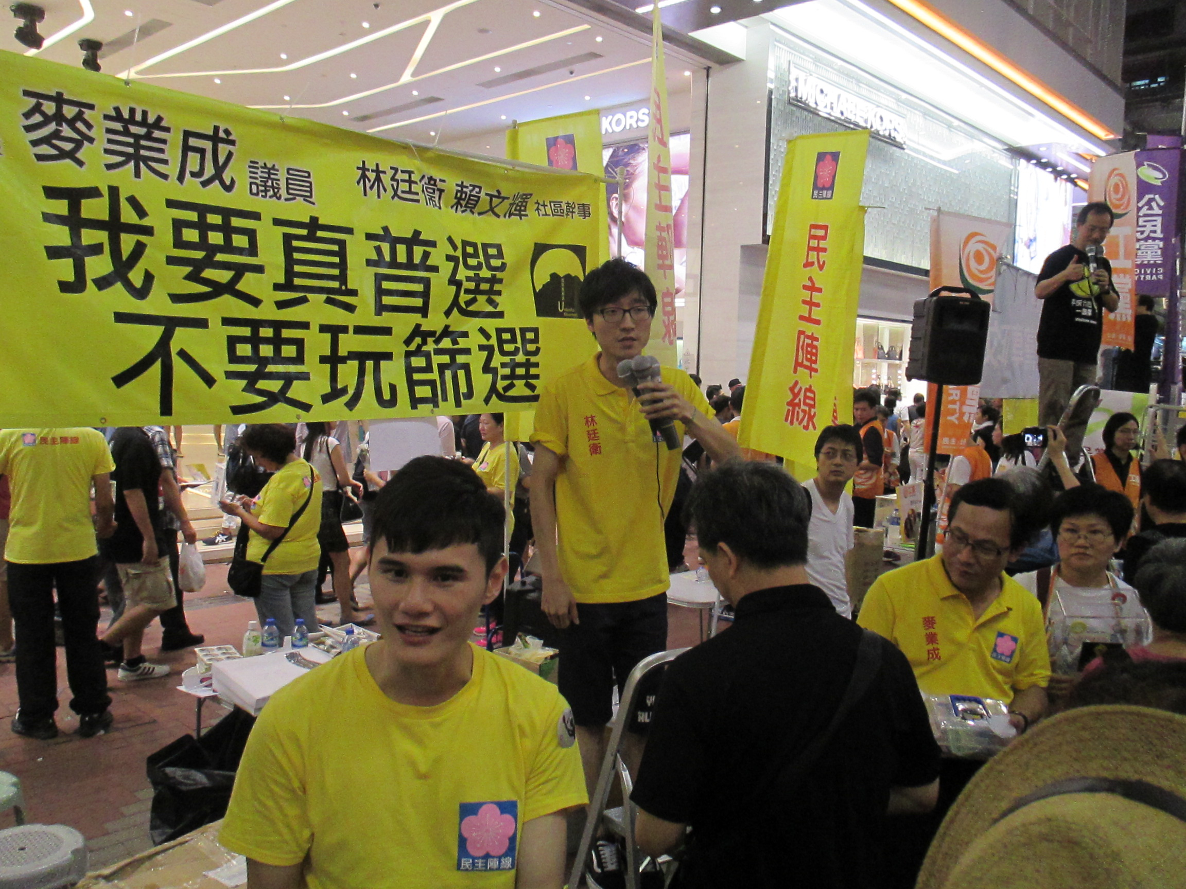 2015年六四，元朗天水圍民主陣線在銅鑼灣紀利佐治街開街站。麥業成議員，林廷衛社區幹事。